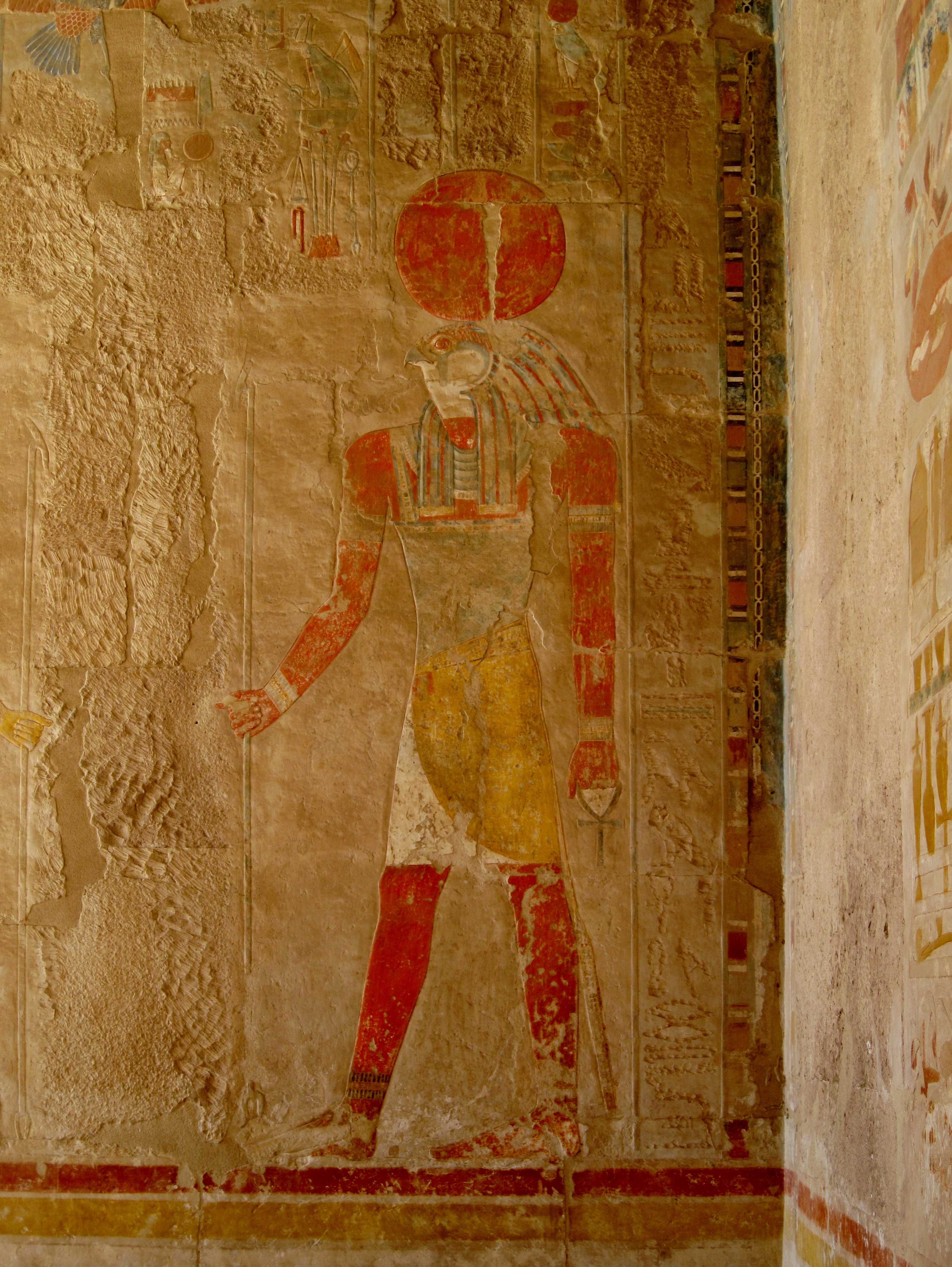 Wandbild im Totentempel der Königin Hatschepsut in Deir el-Bahari (arabisch für „Nordkloster“), Theben-West (Luxor), Ägypten